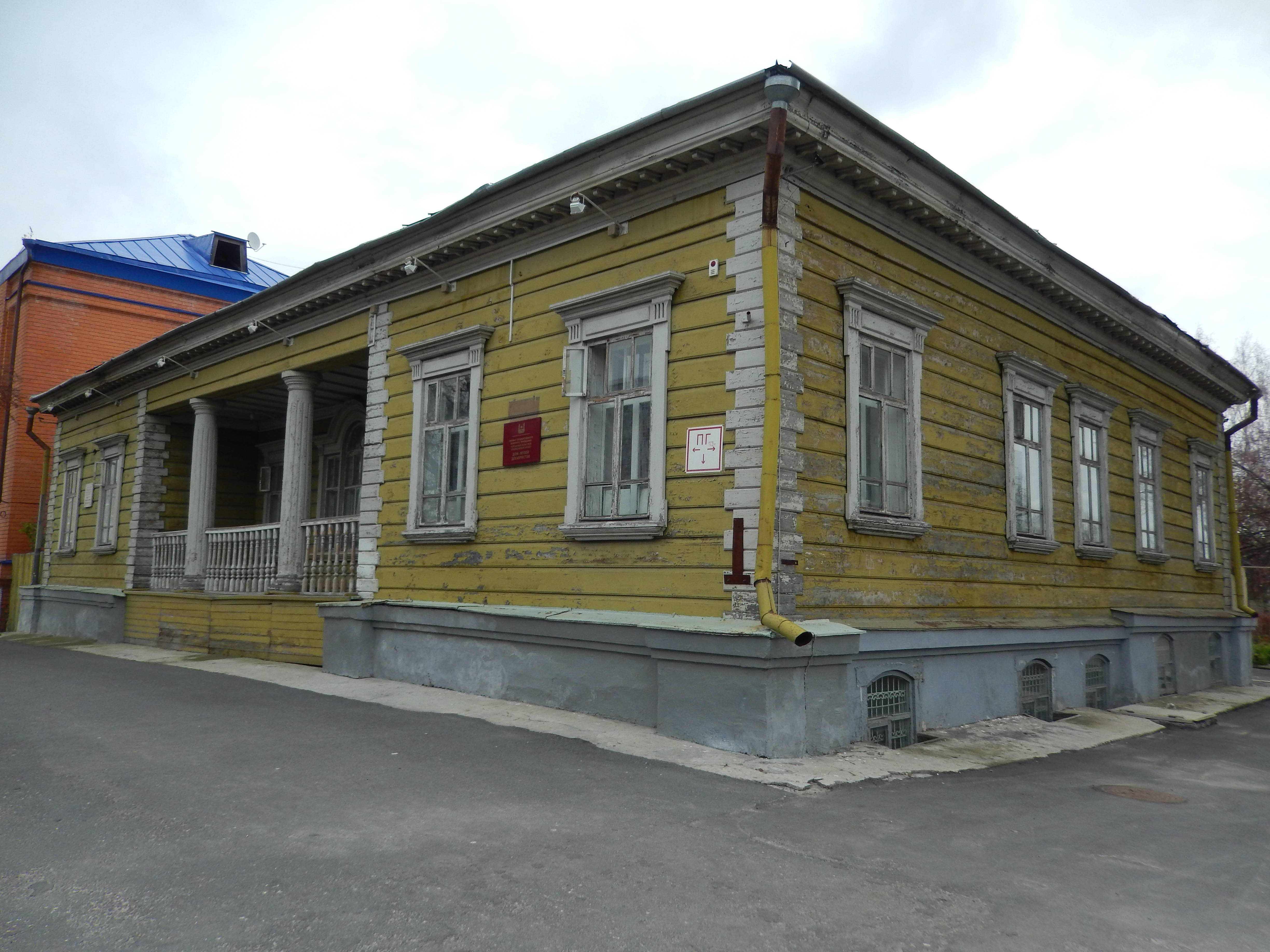 Дом декабриста М.М. Нарышкина (Курганская область, Курган, улица Климова, 80а)